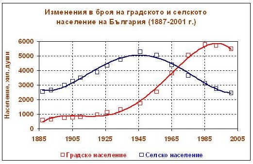 Изменение в числеността на градското и селското население на България (1887-2001 г.)